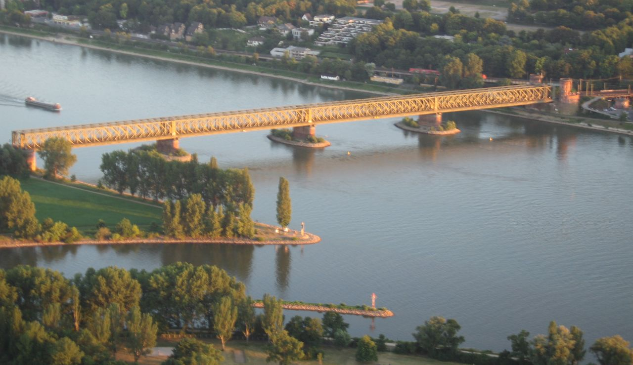 Mainmündung am Abend des 20. Juli 2006 kurz vor Sonnenuntergang mit der Eisenbahnbrücke über den Rhein.